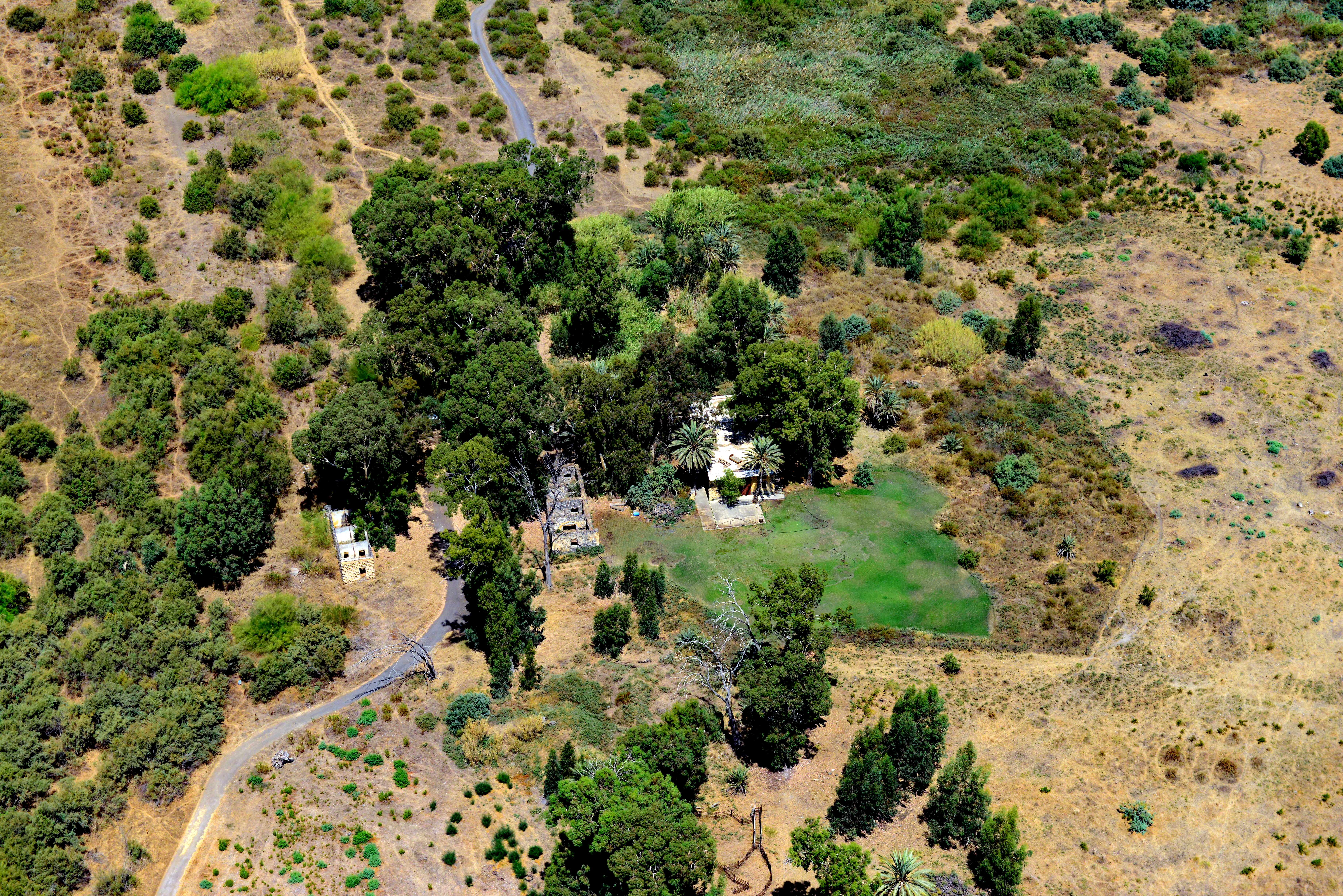 קבוצה של 16 משפחות איכרים יהודיים מחצי האי קרים שבאוקראינה התיישבה במקום כאריסיו של עבדול רחמן פאשה אל יוסוף, בעל אדמות בטיחה